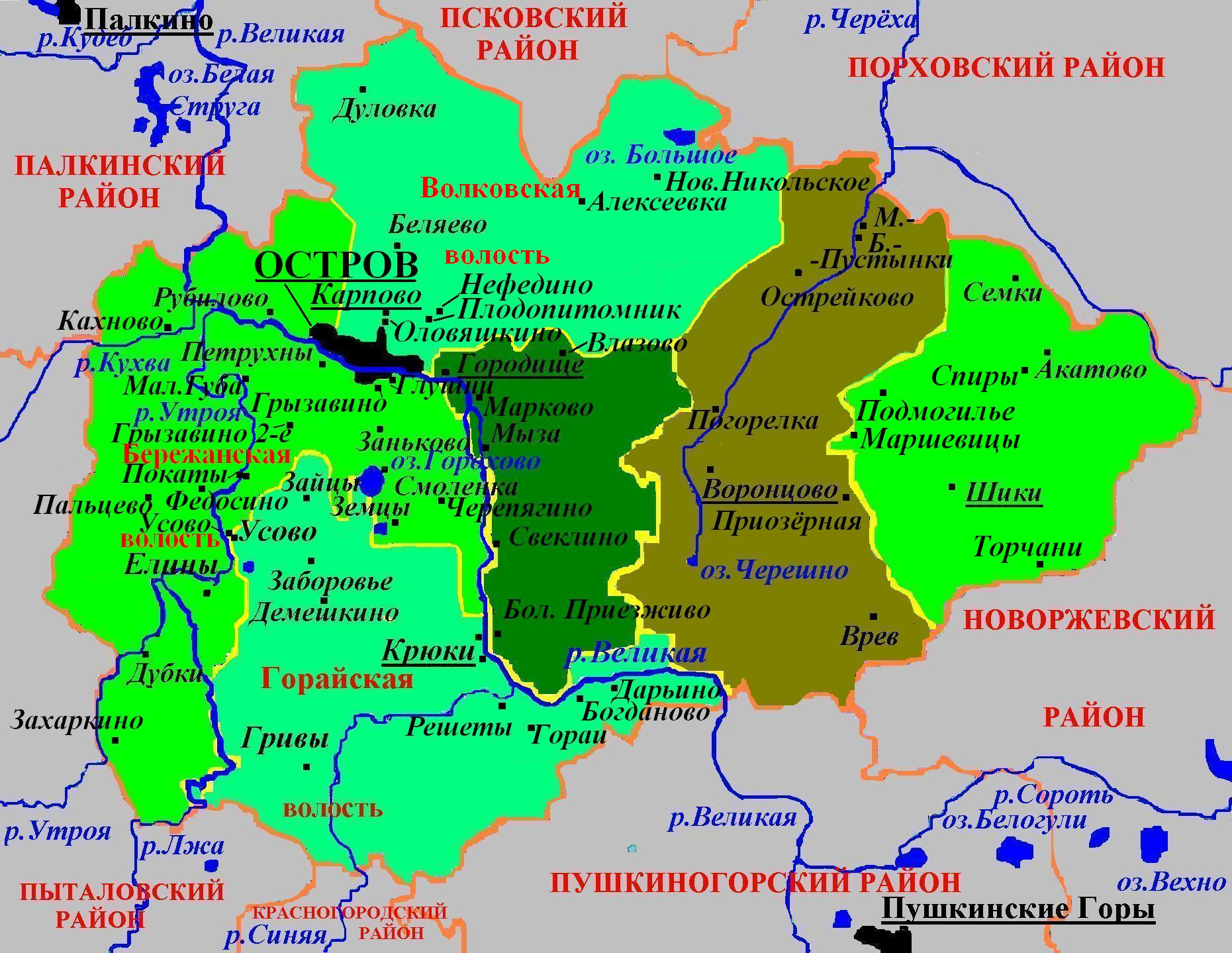 Островский район по ОЗ № 984-ОЗ от 03.06.2010